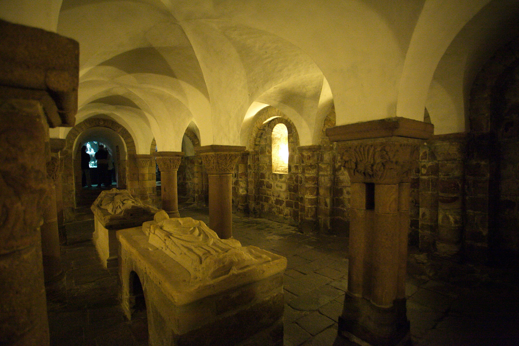 Abbaye Sainte-Croix de Quimperlé (ClasséInscrit) .